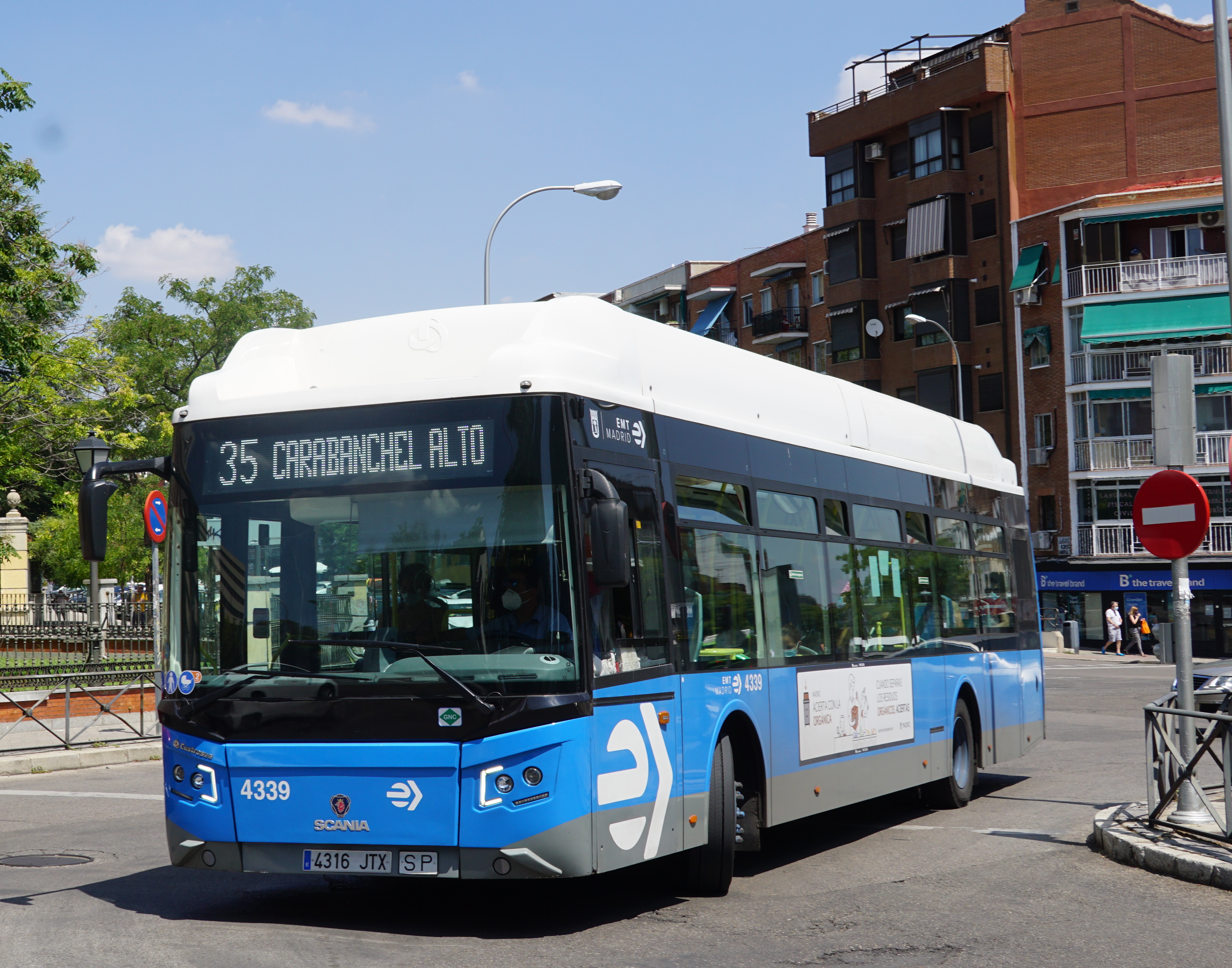 35 EMT Madrid junto al Hospital Gómez Ulloa de Carabanchel, agosto 2020